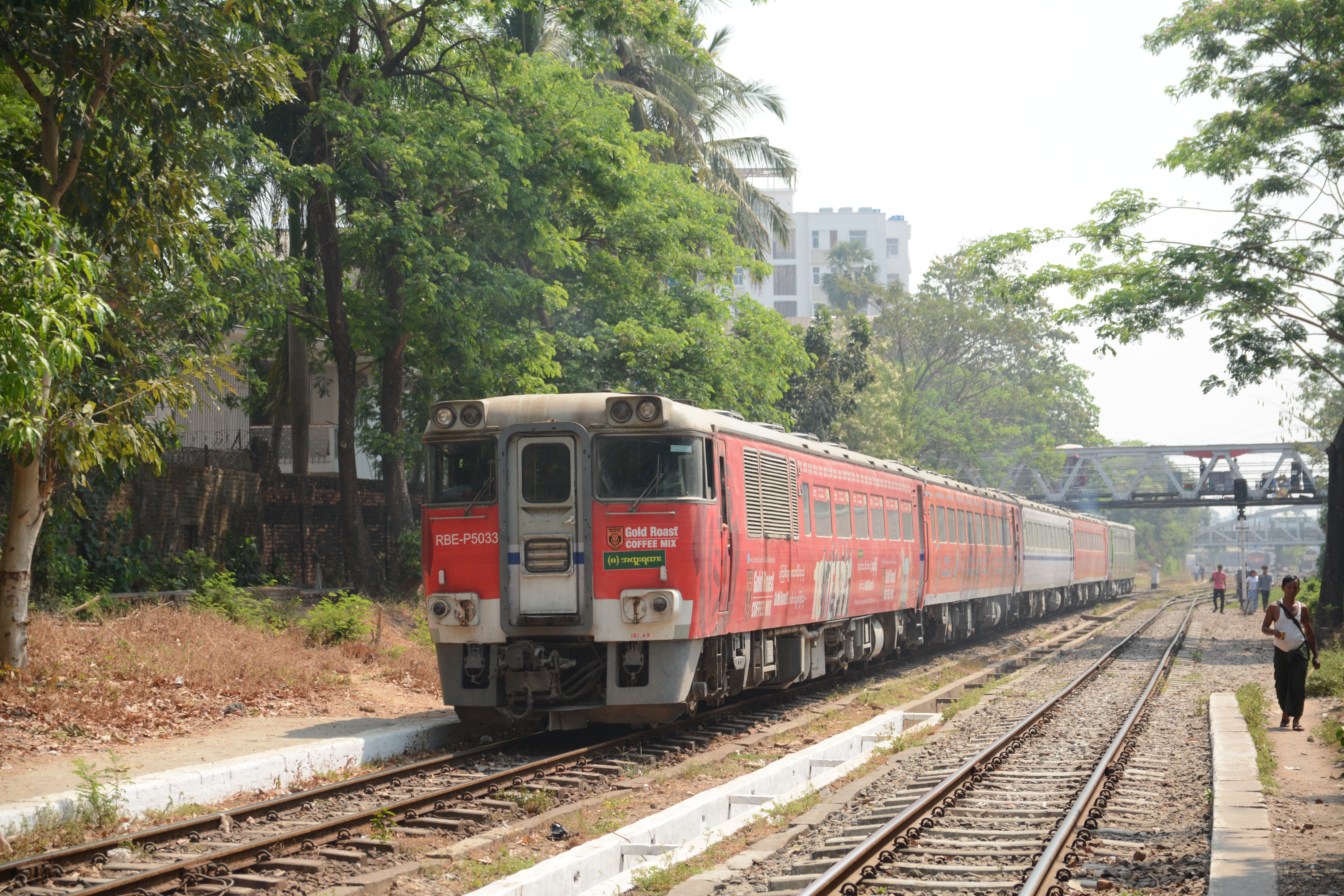 Circle line train myanmar yangon